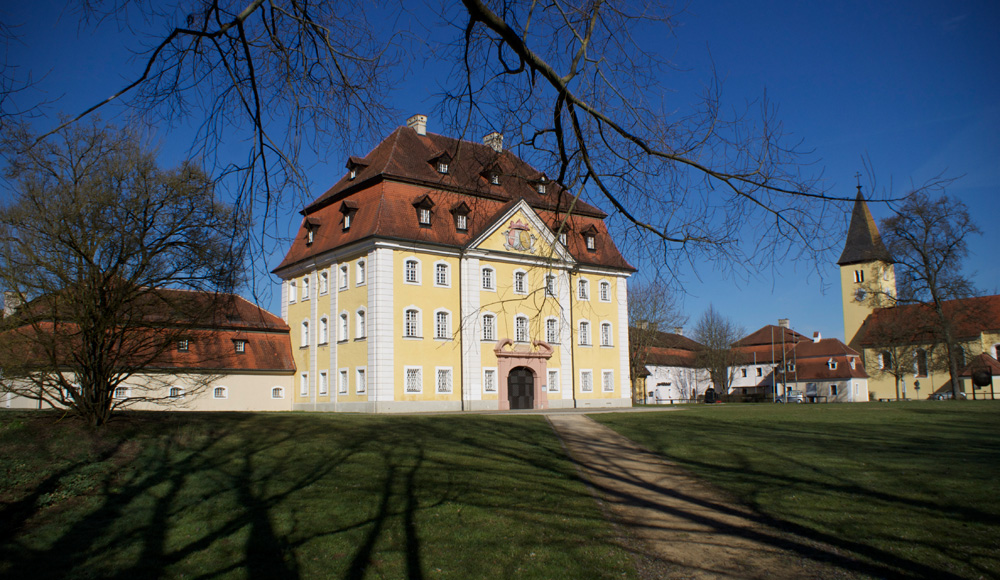 Hammerschloß Theuern (Gemeinde Ebermannsdorf, OT Theuern)